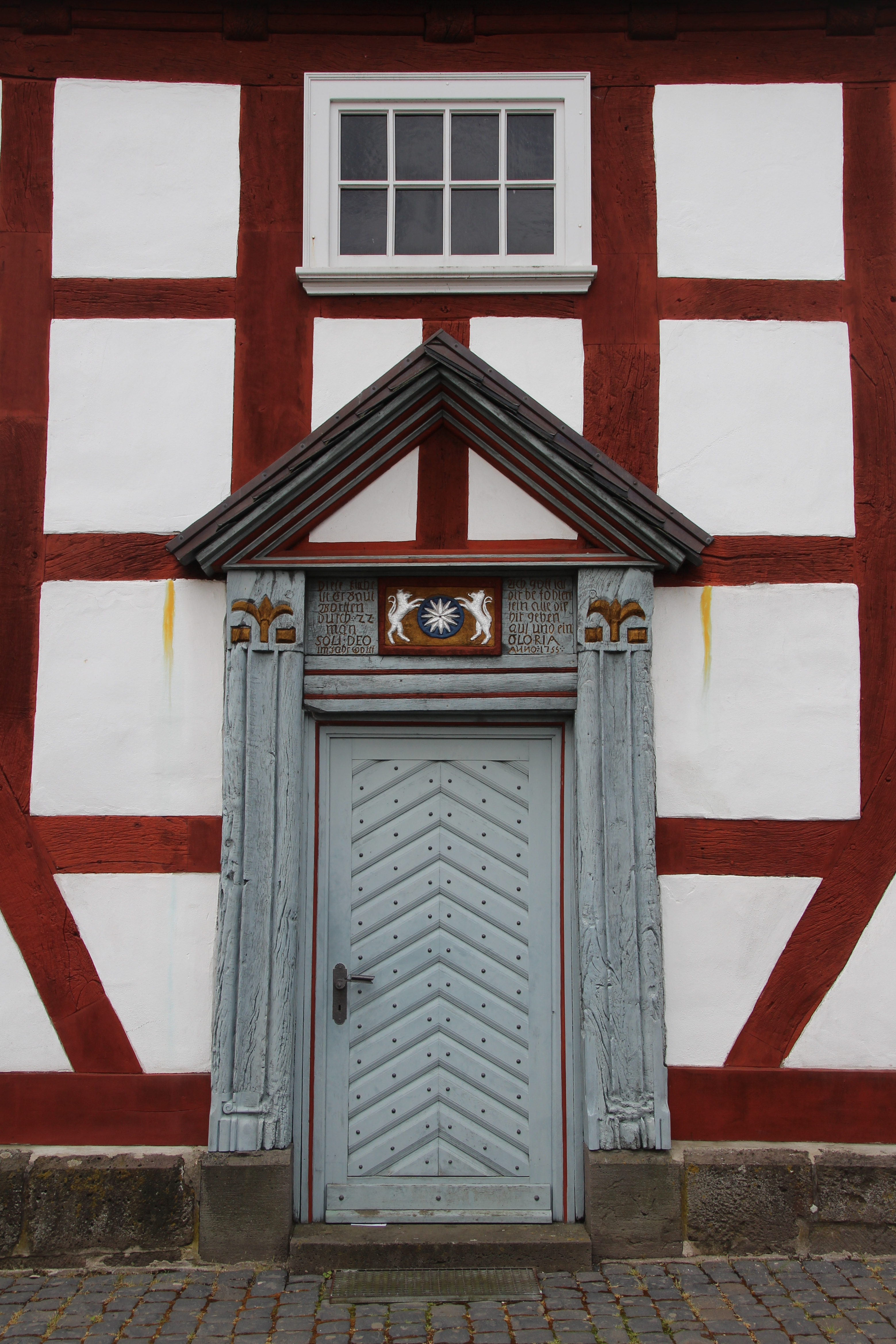 Siehe Bild und Dateiname